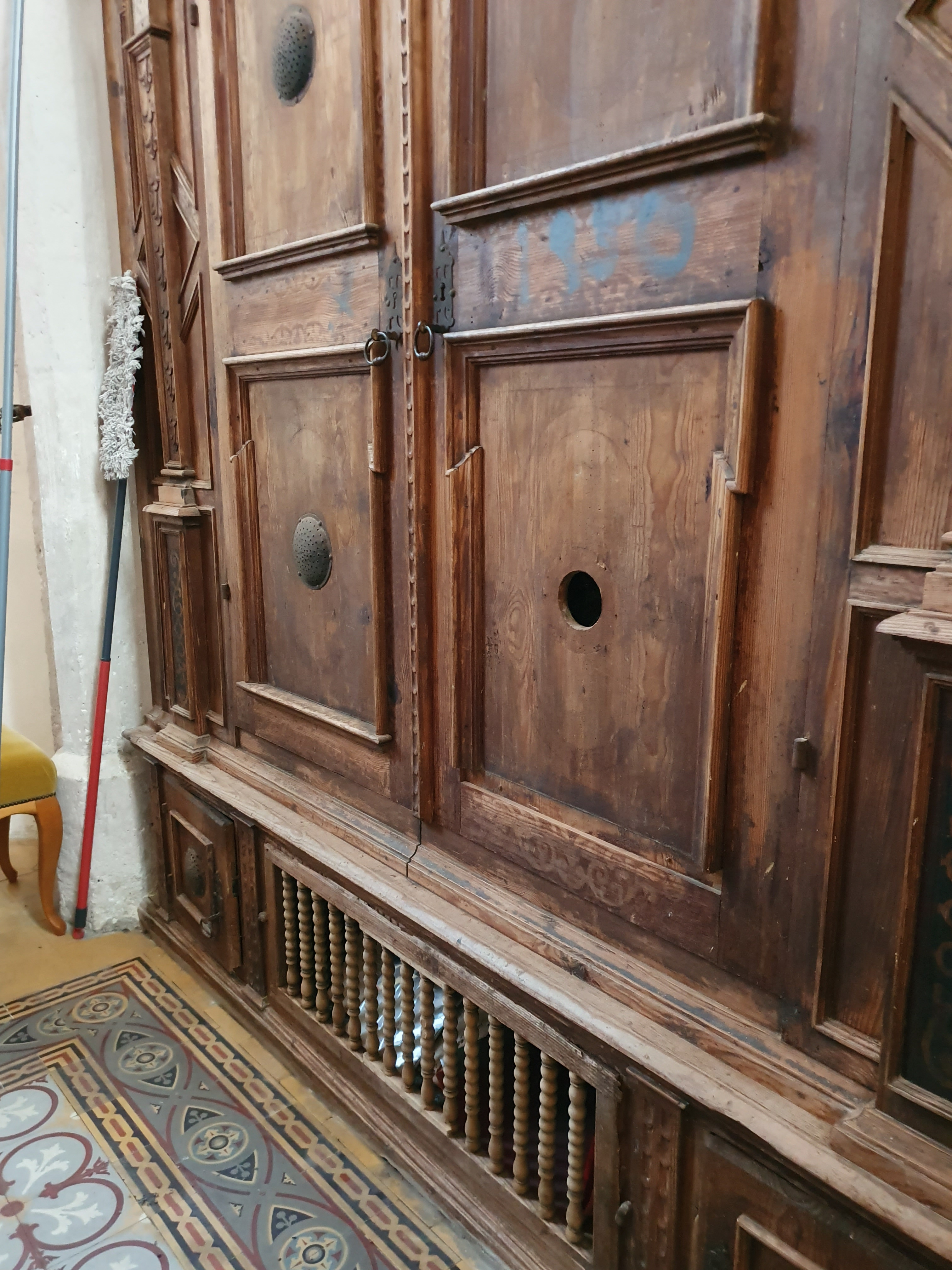 Voliere für Tieropfer: schwarze Hühner wurden bei Epilepsie bzw. die Fraisen geopfert und während der hl. Messe in die Hühnersteige gesperrt